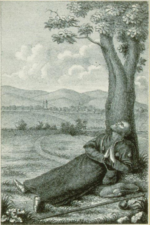 Saint Ludan meurt d'épuisement sous un chêne à Nordhouse en 1202. Lithographie du XIXème siècle.